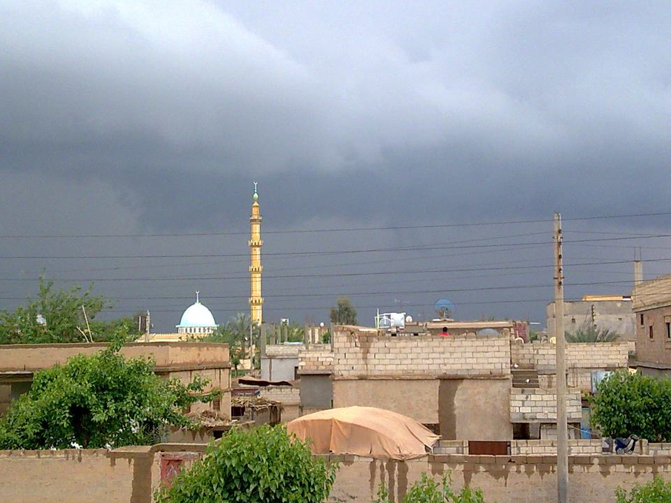 يوم من أيام الشتاء في مدينة القورية ويضهر فيها جامع الإيمان مهد الثورة في المدينة